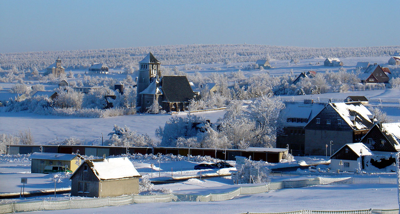 Zinnwald (Erzgebirge), Blick zur deutschen- und tschechischen Kirche